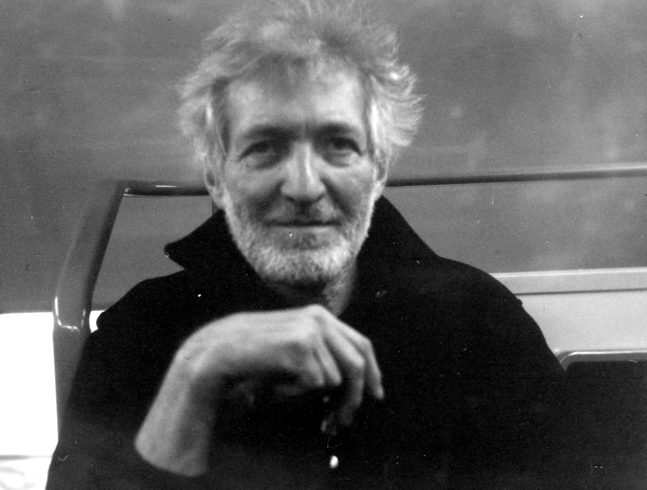 Pierangelo Summa ( Piero Summa ) in 2011, France